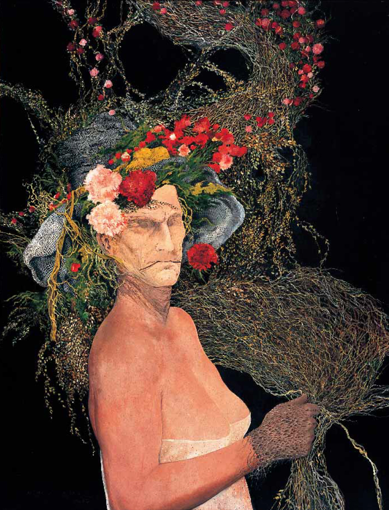 Antonella. Óleo / tabla. 80 x 80 cm. Marcial Gómez 1979